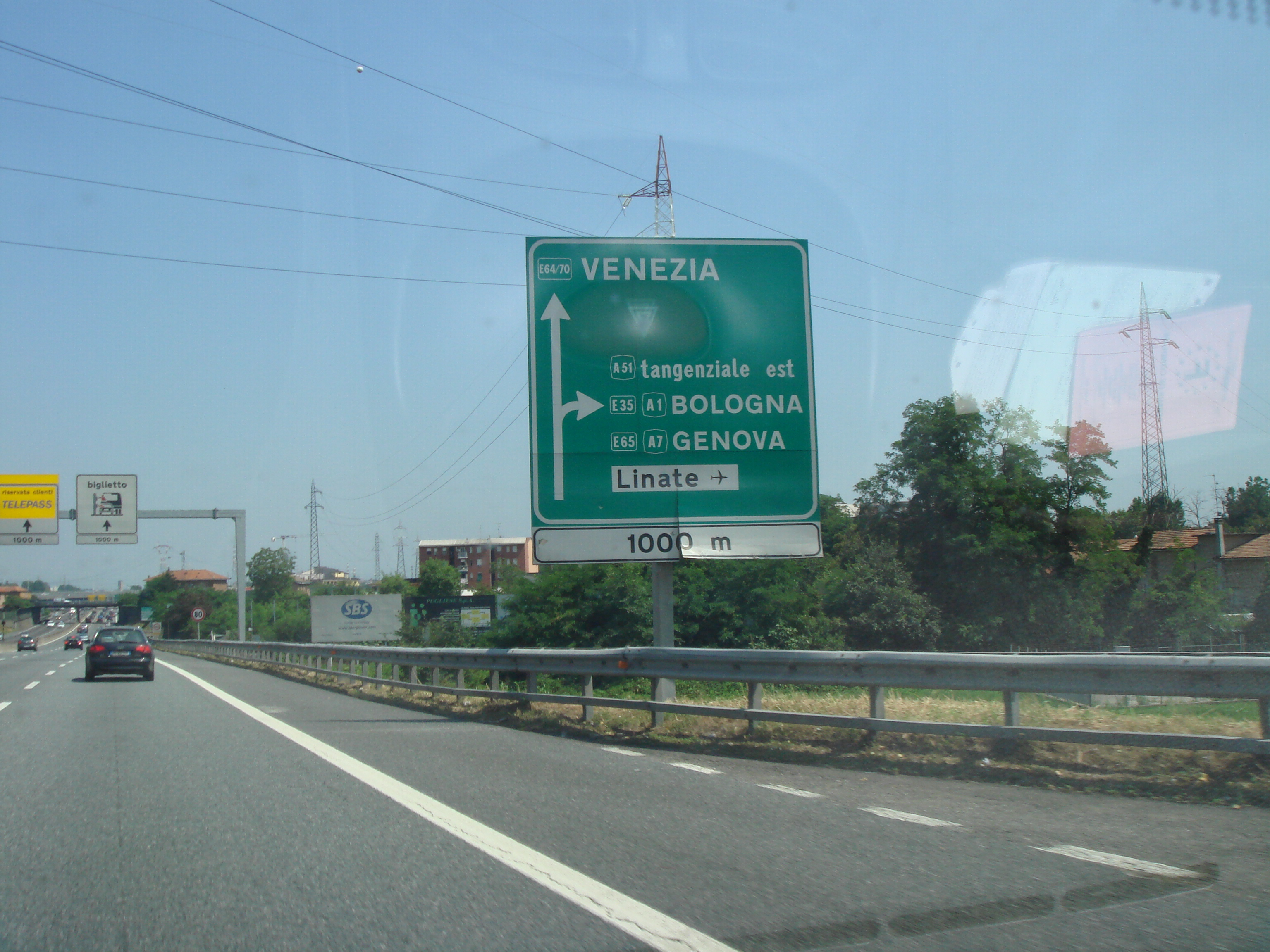 Route européenne 64 près de Milan